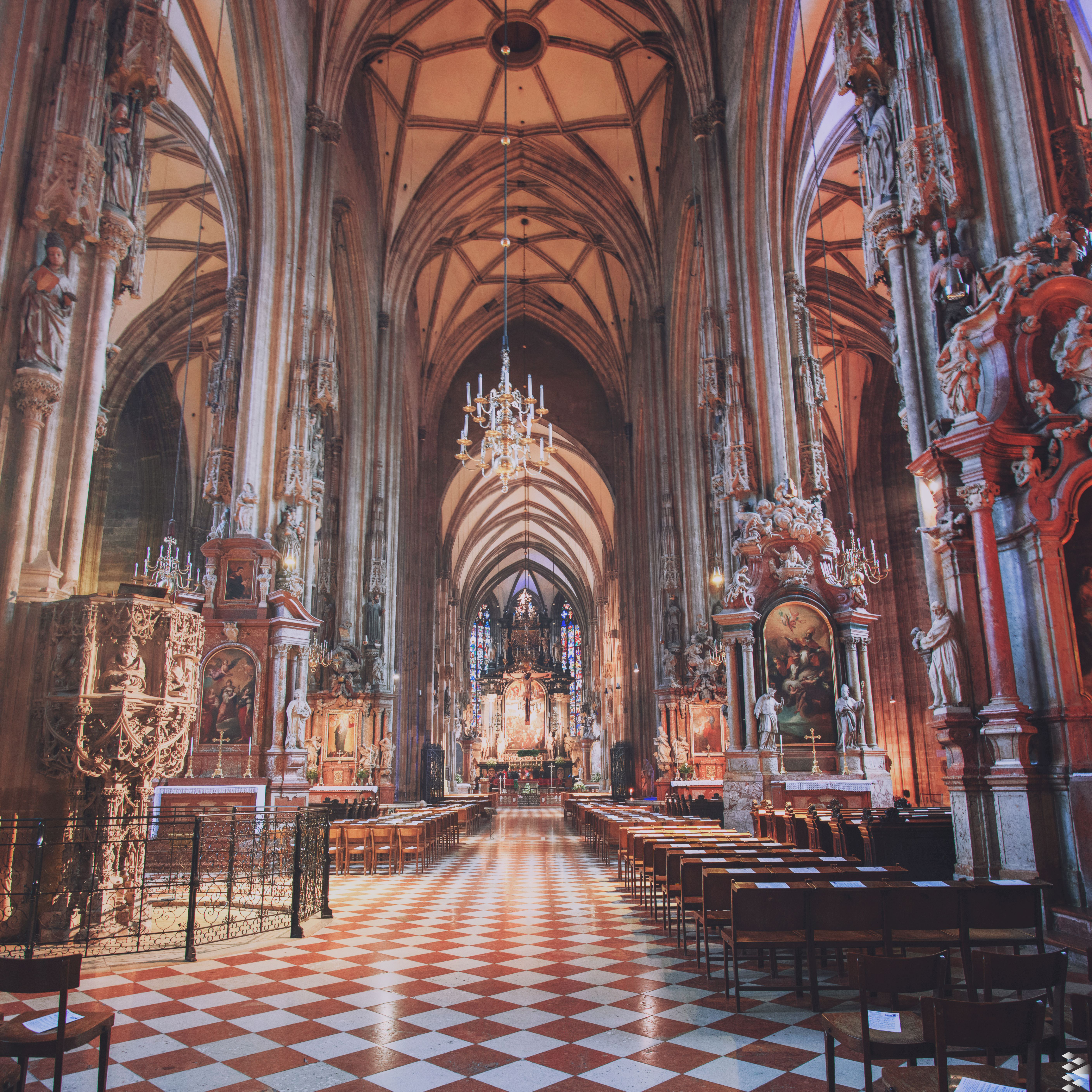 Dóm svätého Štefana je najväčšia katedrála vo Viedni.